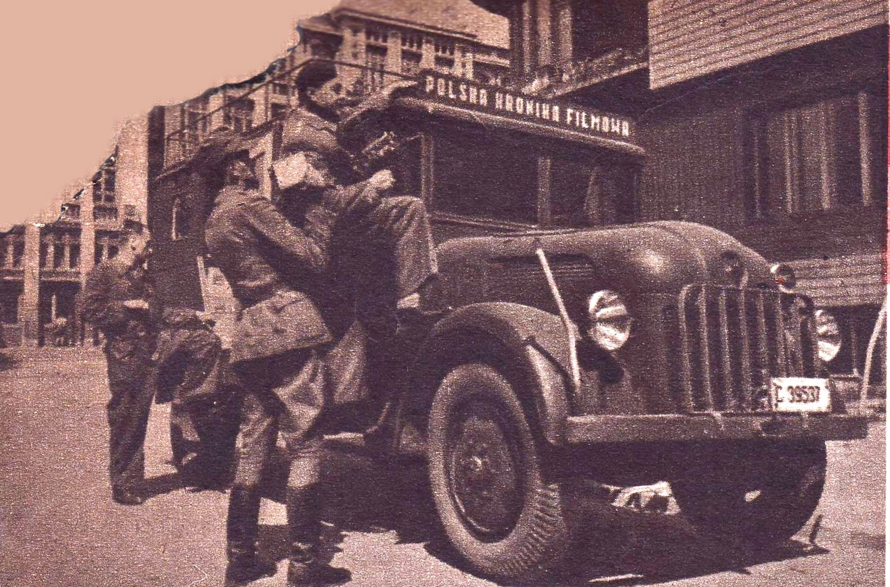 Antoni Wawrzyniak i asystent ładują sprzęt filmowy do samochodu Polskiej Kroniki Filmowej. Samochód Steyr 1500A z 1941 roku należał wcześniej do niemieckiego wojska i został zdobyty przez Polaków jako odszkodowanie wojenne. W połowie lat 50. XX w. Polska została zmuszona przez ZSRR do zaniechania odbioru od Niemiec reparacji wojennych co jednak nie przeszkodziło Polakom w zdobywaniu indywidualnych odszkodowań od Niemiec w latach 90. XX w. za pracę niewolniczą podczas drugiej wojny światowej. Odszkodowania wypłacała fundacja „Polsko-Niemieckie Pojednanie” z pieniędzy z Niemiec i z Austrii.